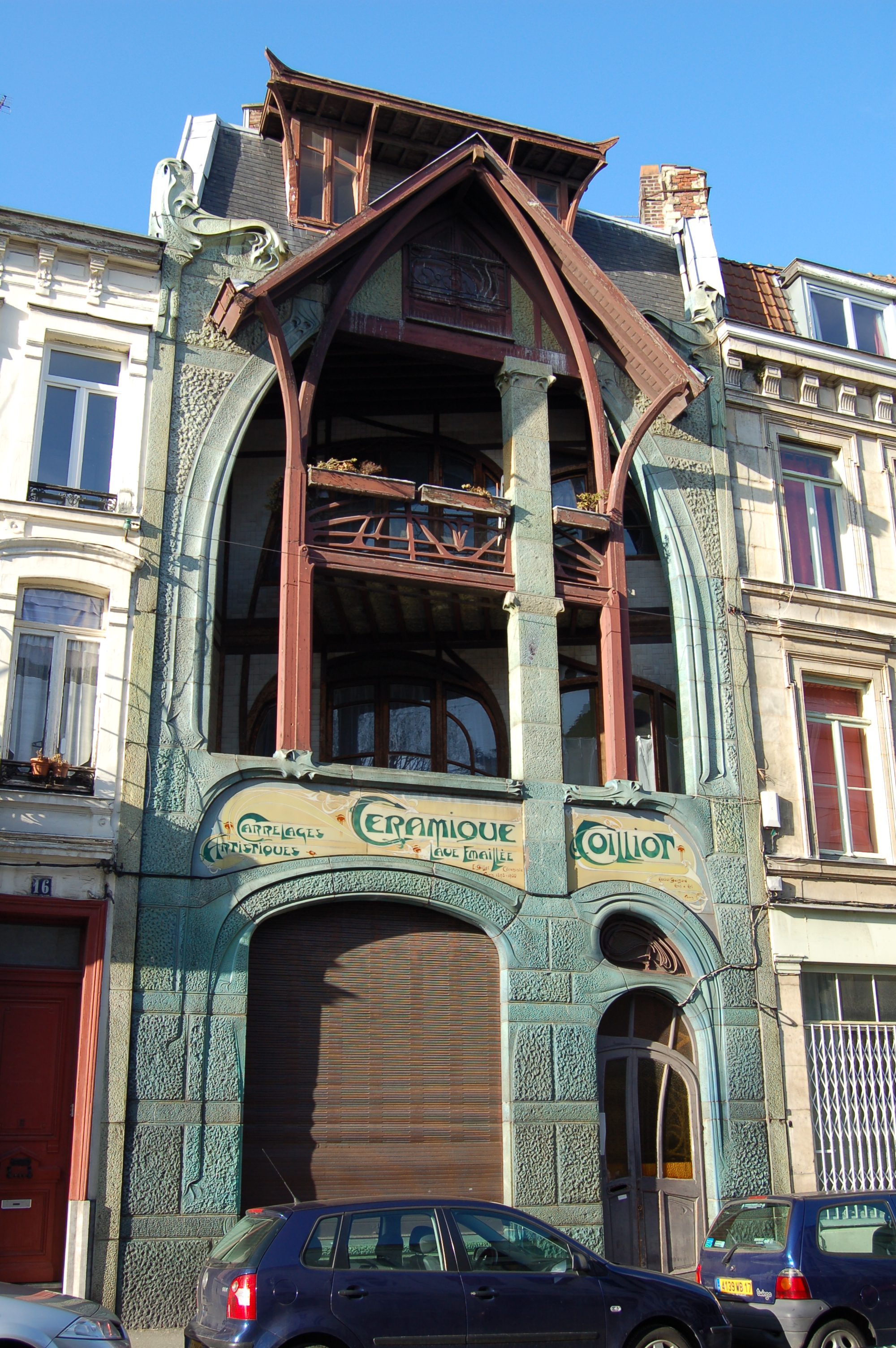 Maison Coilliot 14 rue de Fleurus à Lille (France)